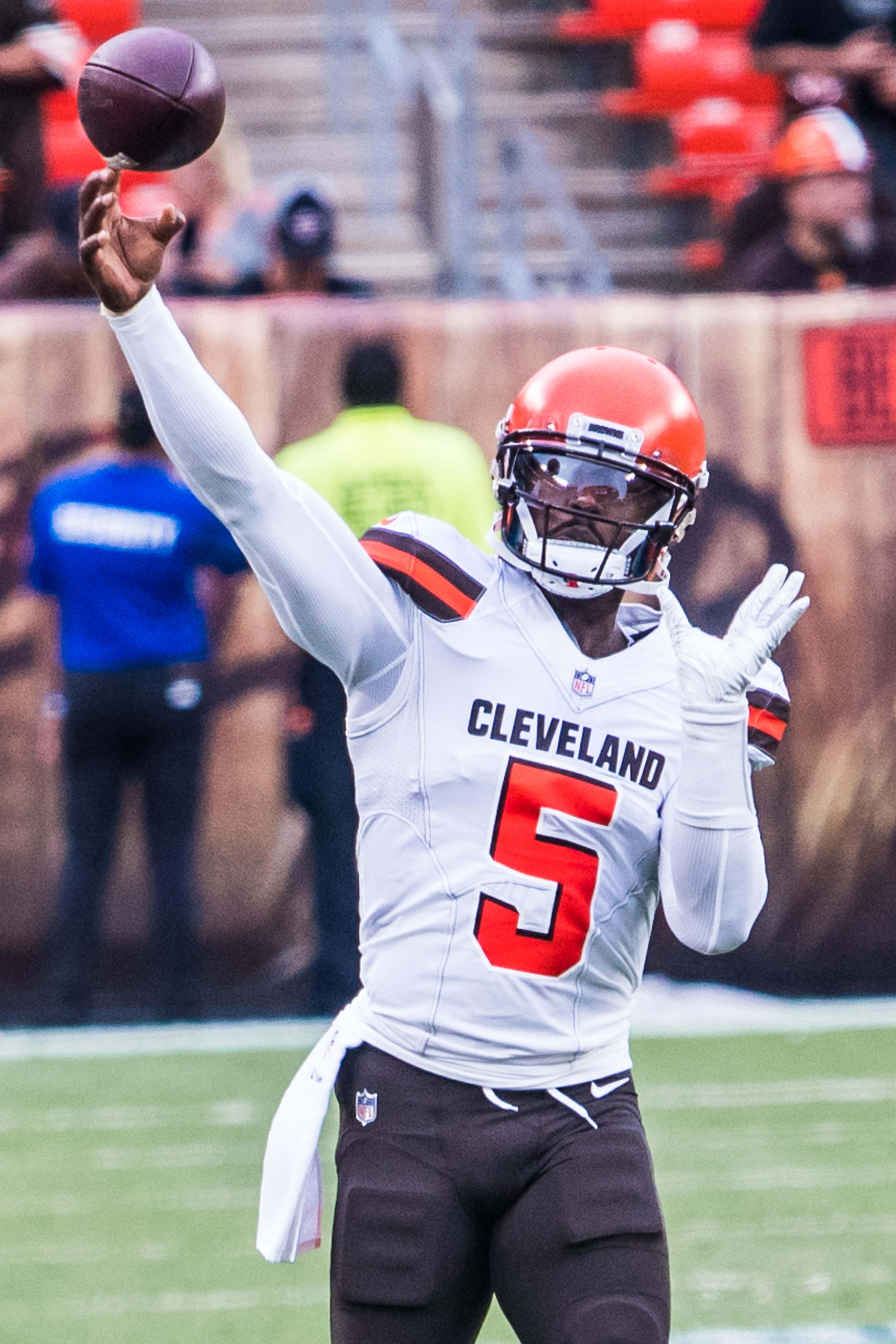 Tyrod Taylor